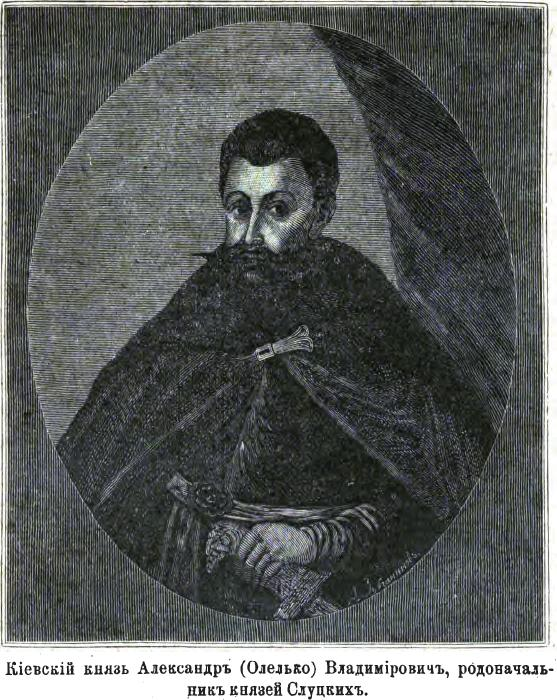 Олелько Владимирович - киевский князь из династии Гедиминовичей.